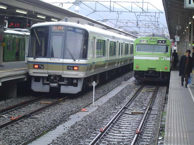 221系「みやこ路快速」と103系普通列車（2005年1月6日京都駅で投稿者が撮影）